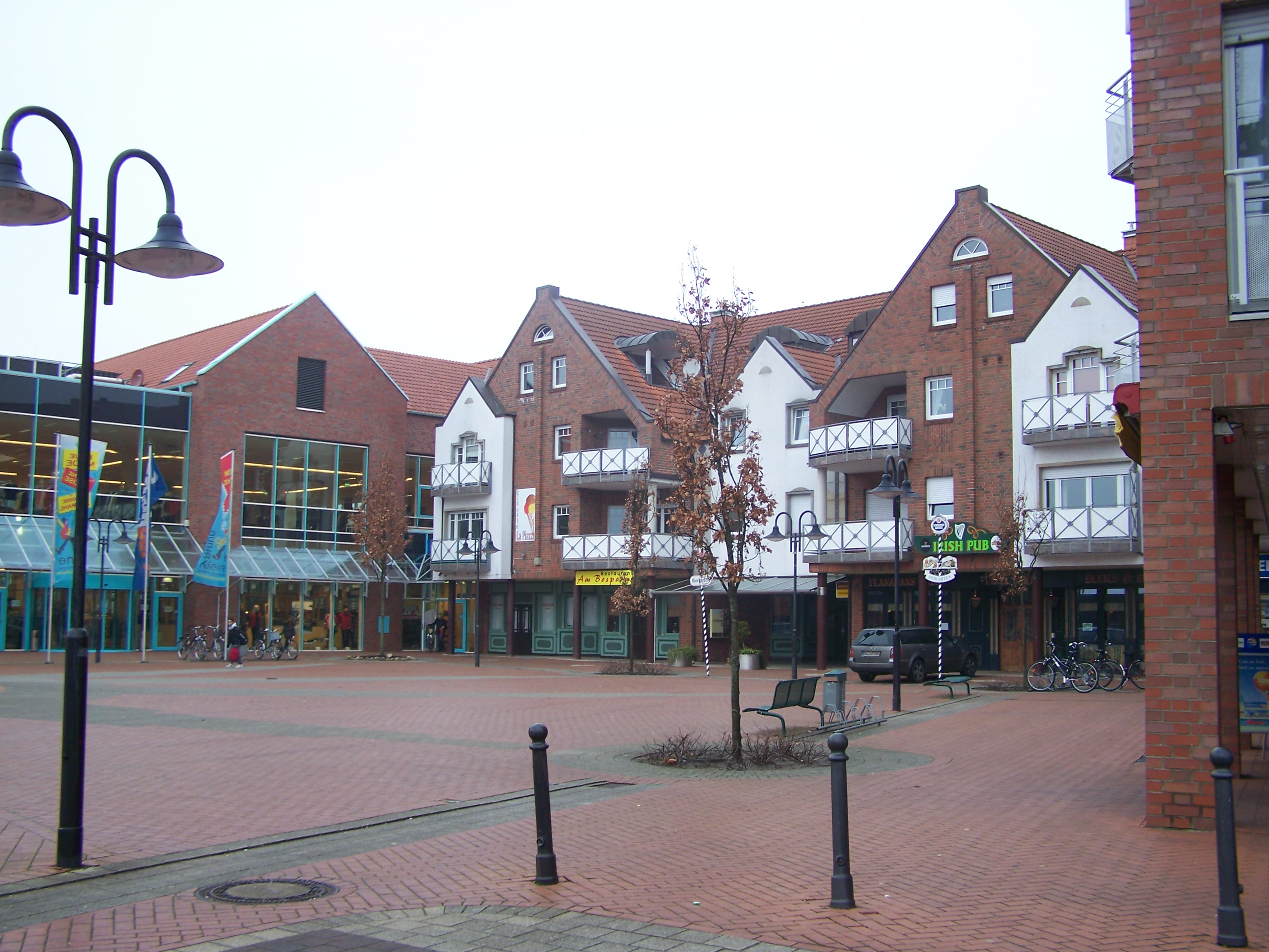 Markeloplatz in Spelle (Markelo ist die niederländische Partnergemeinde)